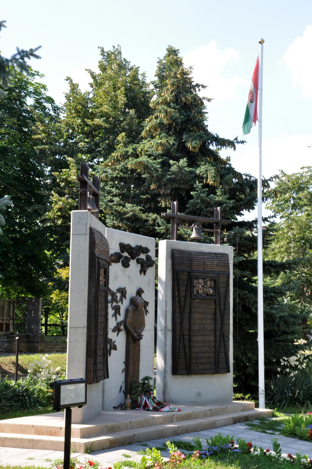 Memorial for the people deported from Budapest